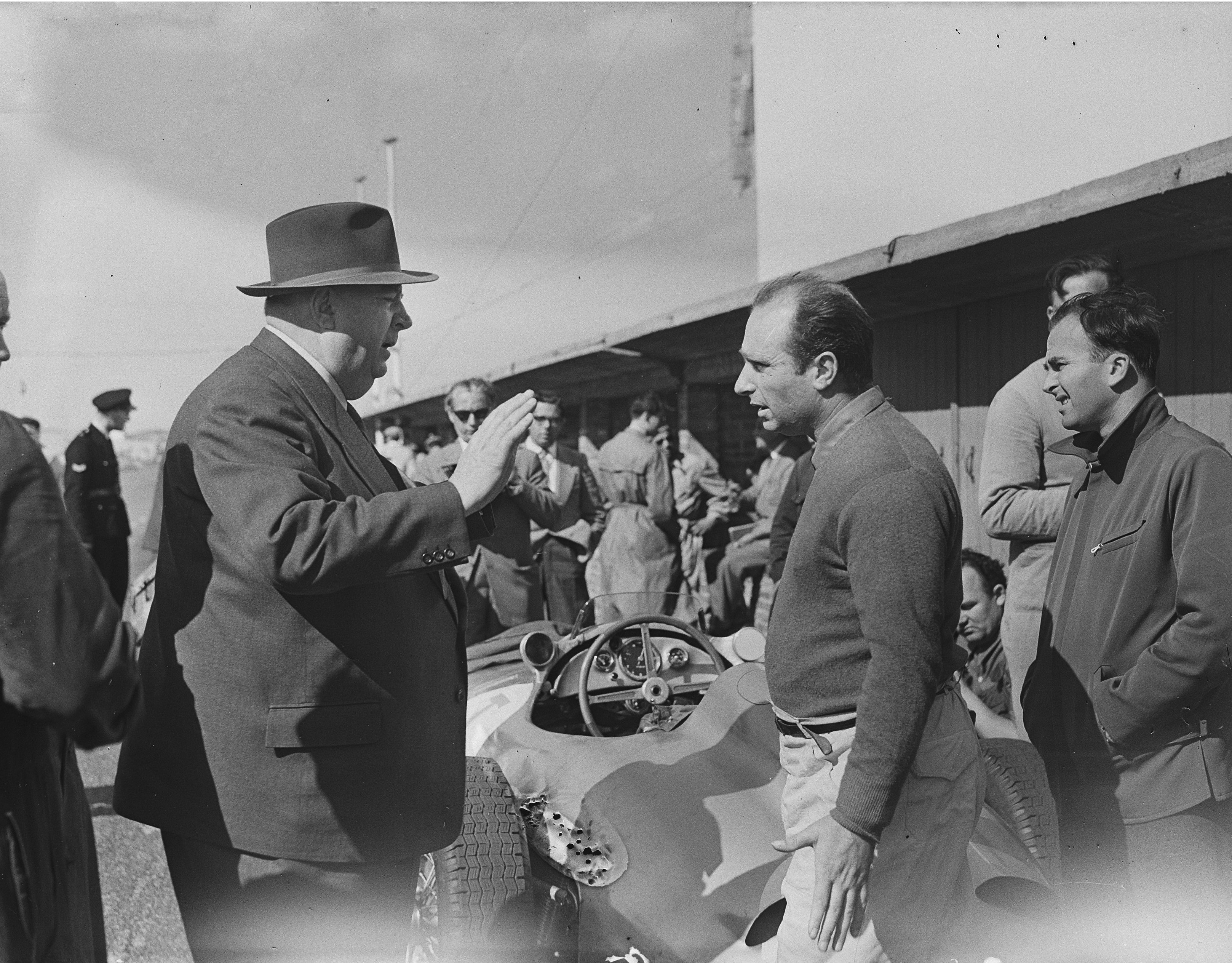 Collectie / Archief : Fotocollectie Anefo Reportage / Serie : [ onbekend ] Beschrijving : Training voor Grote Prijs van Nederland op Zandvoort, leider van de Mercedesploeg Alfred Neubauer (met hoed) in gesprek met Juan-Manuel Fangio Datum : 17 juni 1955 Locatie : Noord-Holland, Zandvoort Trefwoorden : auto's, coureurs, managers Persoonsnaam : Fangio Juan-Manuel, Neubauer Alfred Fotograaf : Bilsen, Joop van / Anefo Auteursrechthebbende : Nationaal Archief Materiaalsoort : Glasnegatief Nummer archiefinventaris : bekijk toegang 2.24.01.09 Bestanddeelnummer : 907-1856